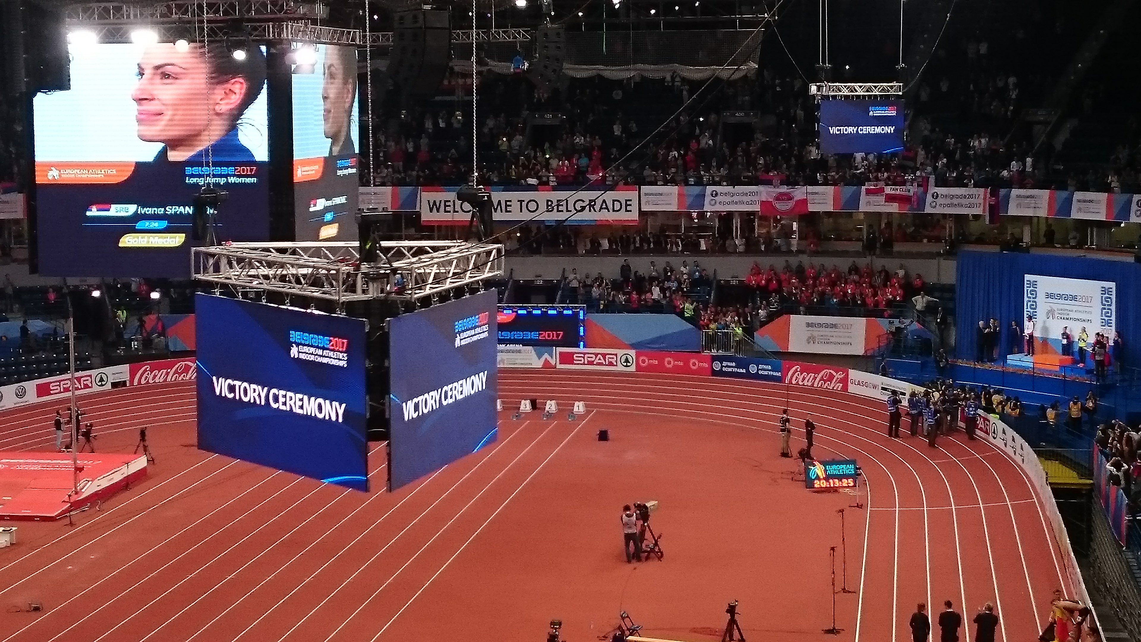 Evropsko prvenstvo u atletici u dvorani 2017 - proglašenje pobednika - Ivana Španović